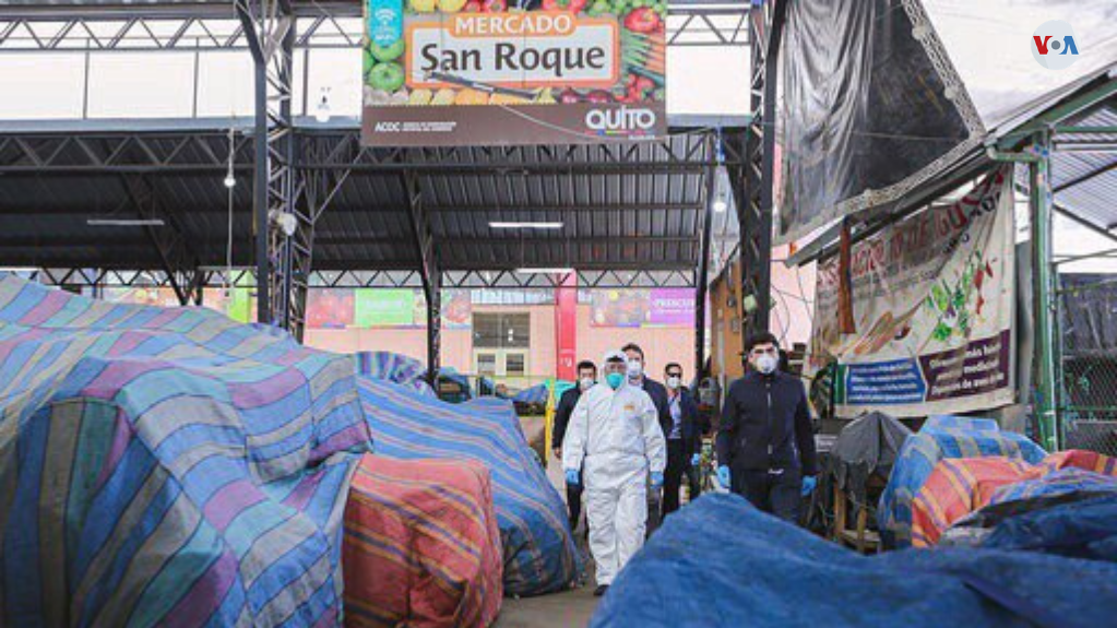 Como medida para sortear el impacto económico de la pandemia en el país, el presidente Lenín Moreno ordenó una reducción del 50% de los salarios de los principales funcionarios y diputados. Foto: Cortesía.